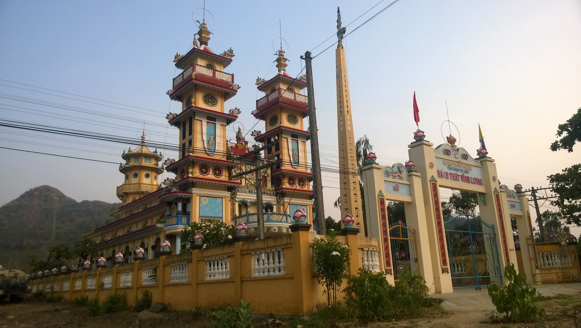 Thánh thất Vĩnh Lương, Nha Trang